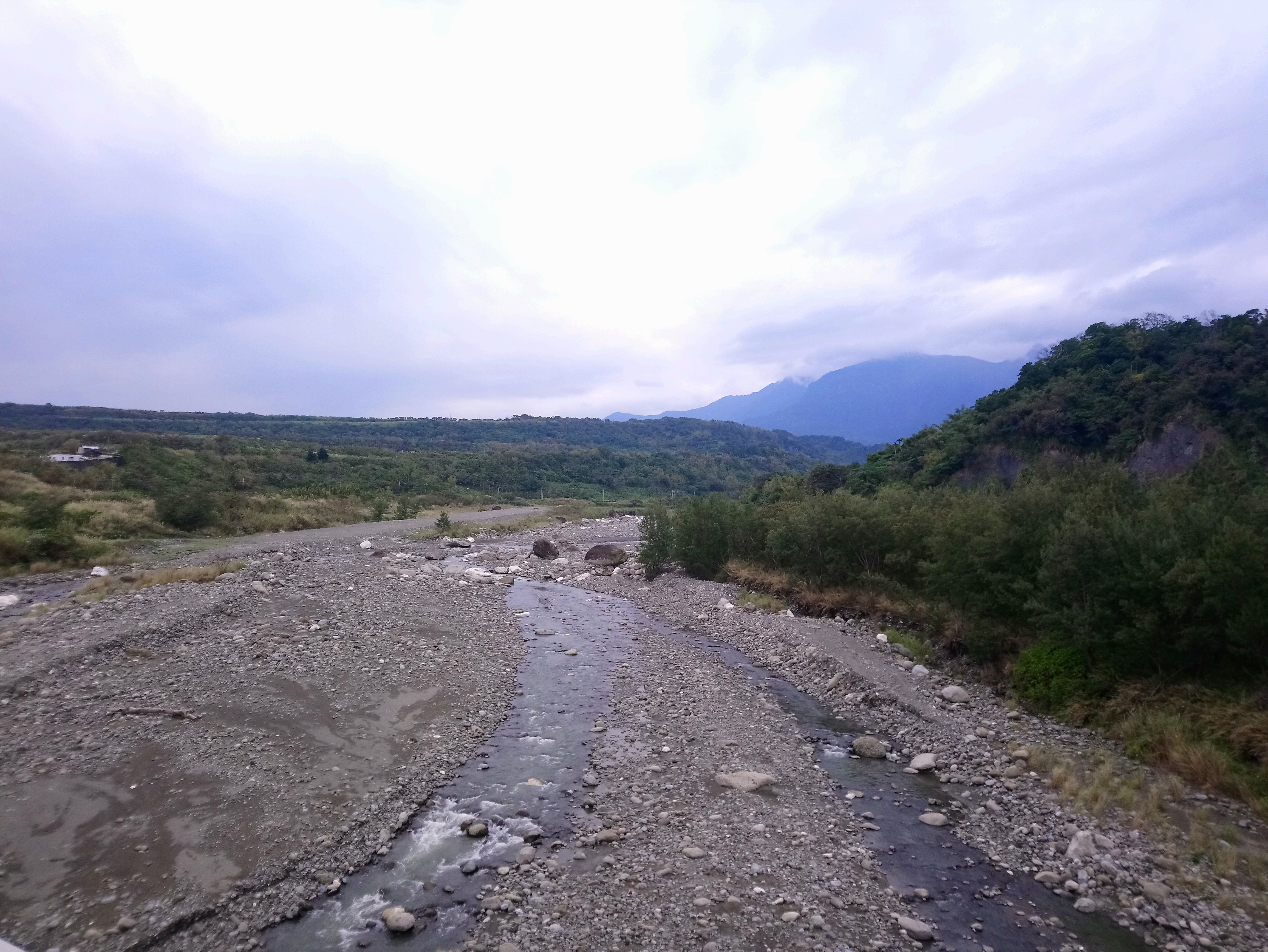 臺灣臺東縣富家溪